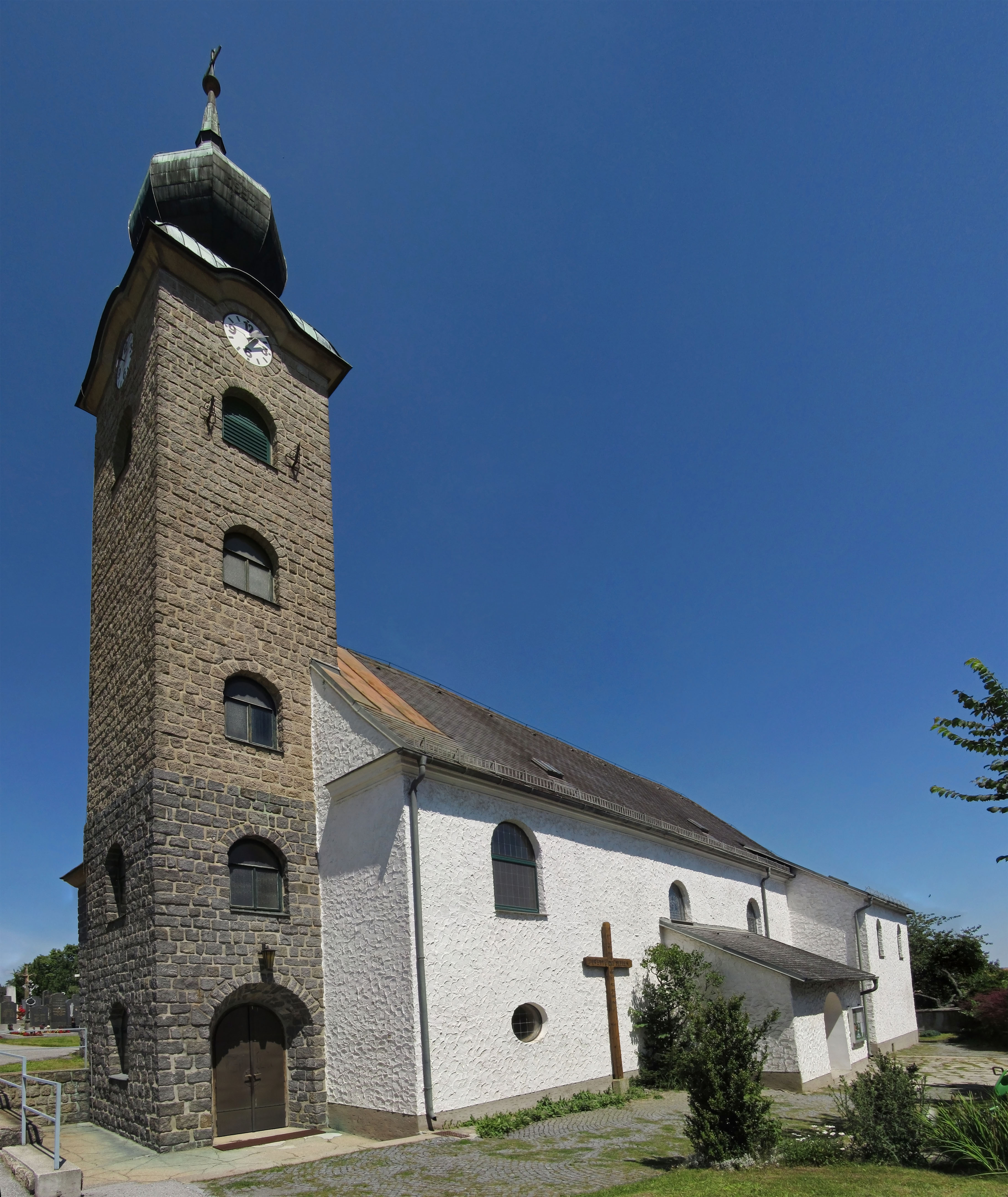 Im Kern romanische und gotische, im 19. Jahrhundert veränderte Saalkirche mit neuem Westturm; 1910 verlängert.